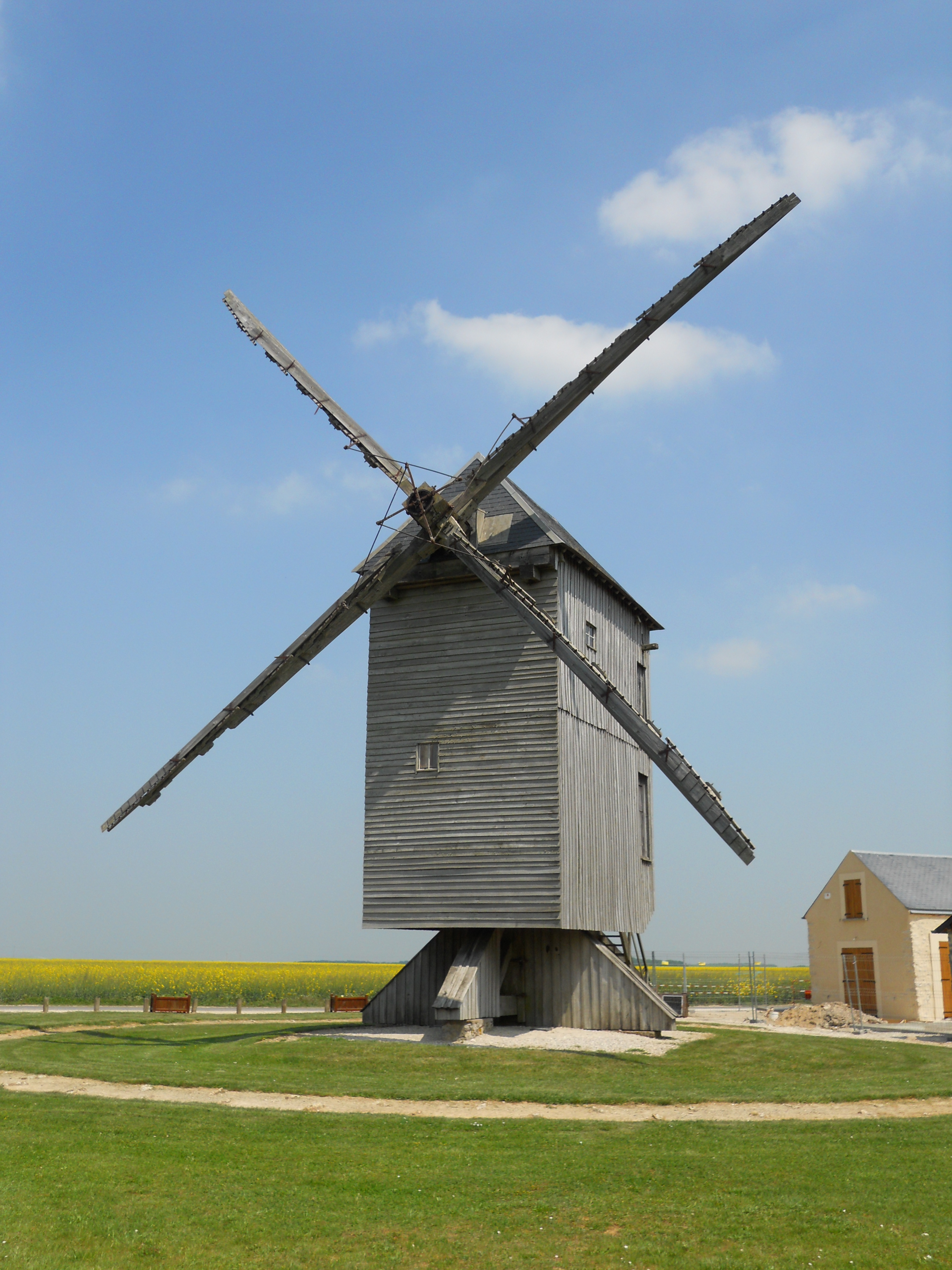 Moulin à vent d'Ouarville, (Classé, 1941) .